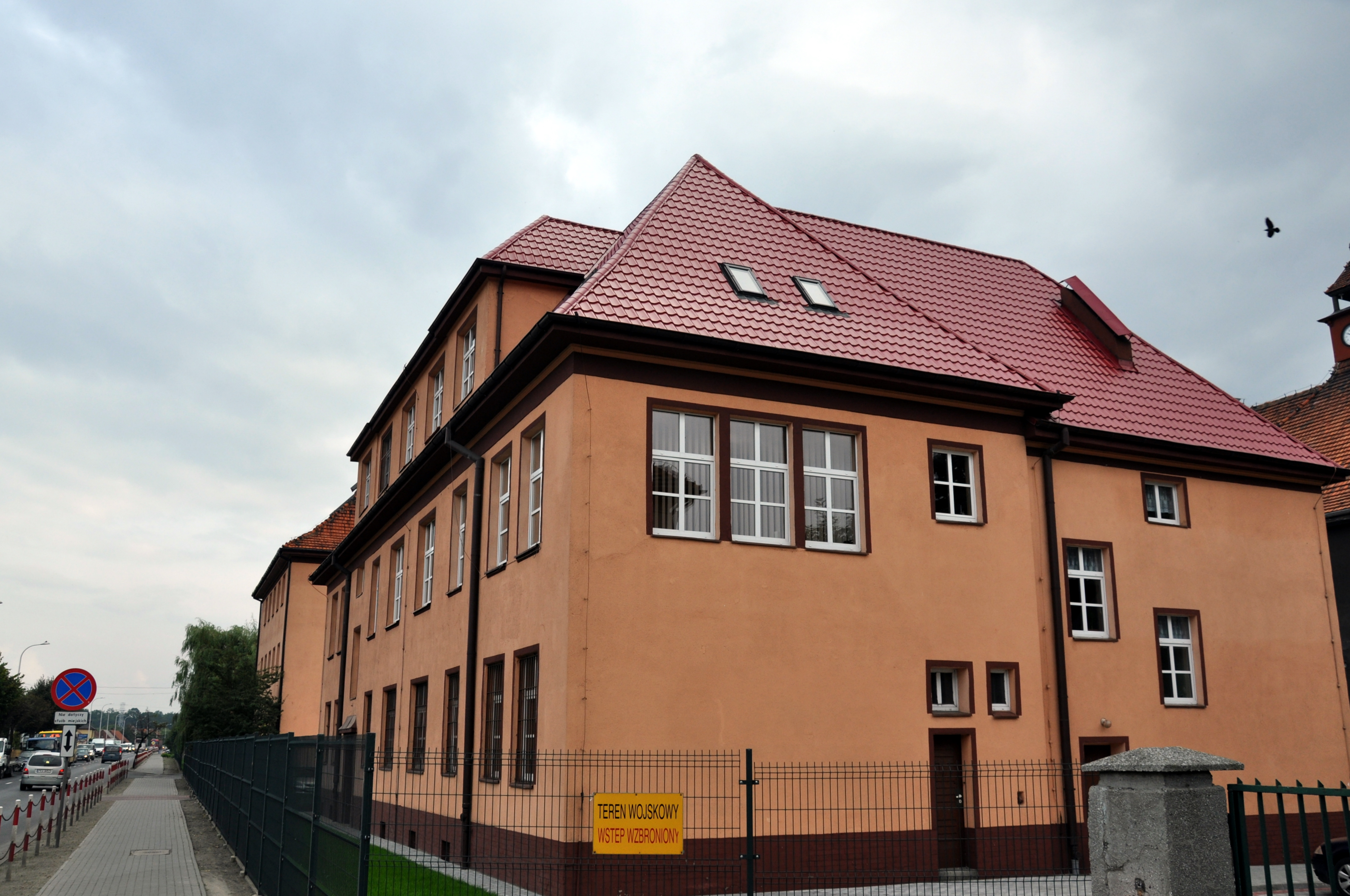 Koszary w Jarocinie